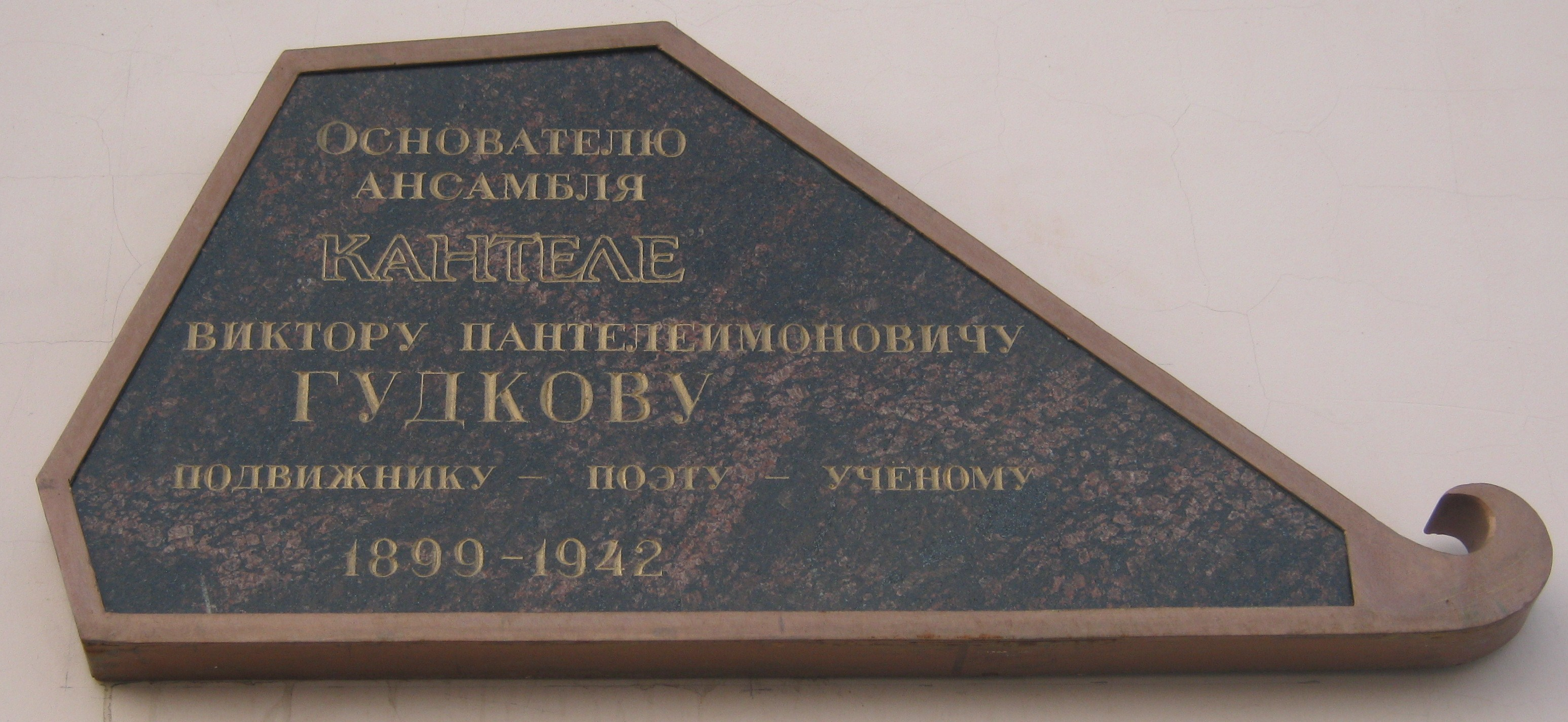 Мемориальная доска в Петрозаводске